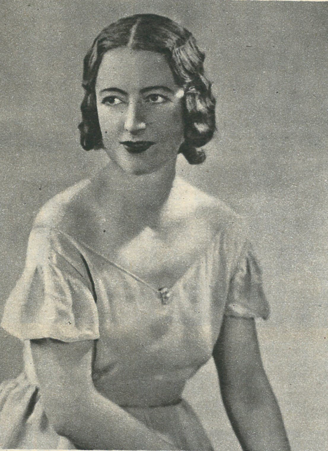 Clavicembalista Corradina Mola